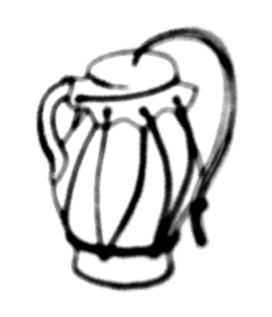 Fanfrnoch, kresba fixou